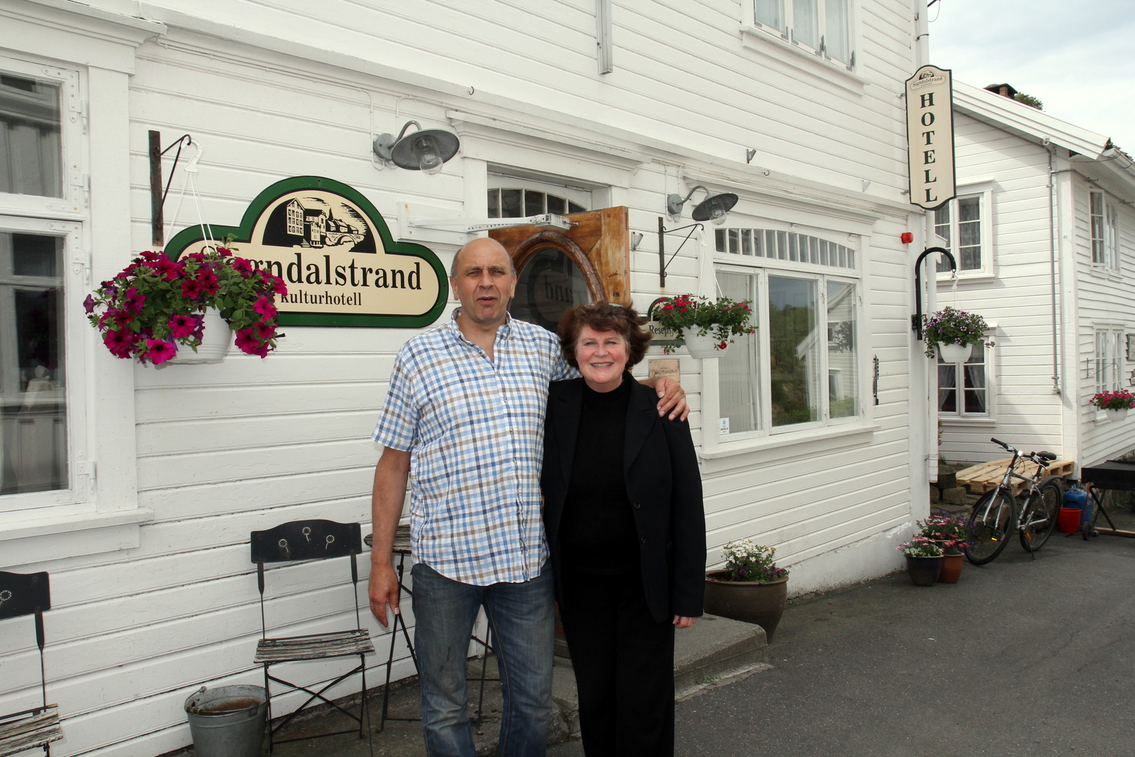 Sogndalstrand Kulturhotell sin hovedbygning med Eli Laupstad Omdal og Jan Oddvar Omdal i forgrunnen